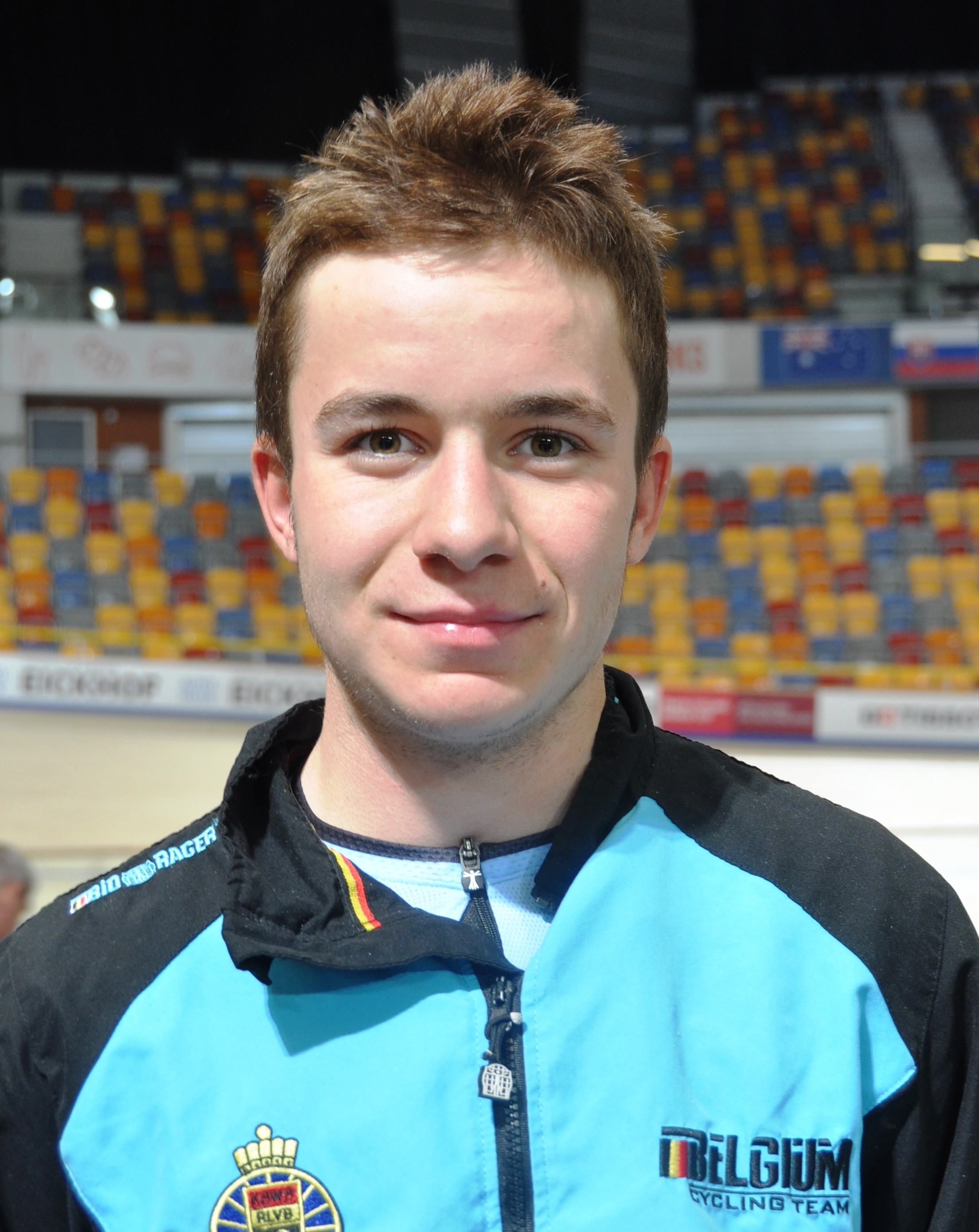 Gerben Thijssen, belgischer Radsportler